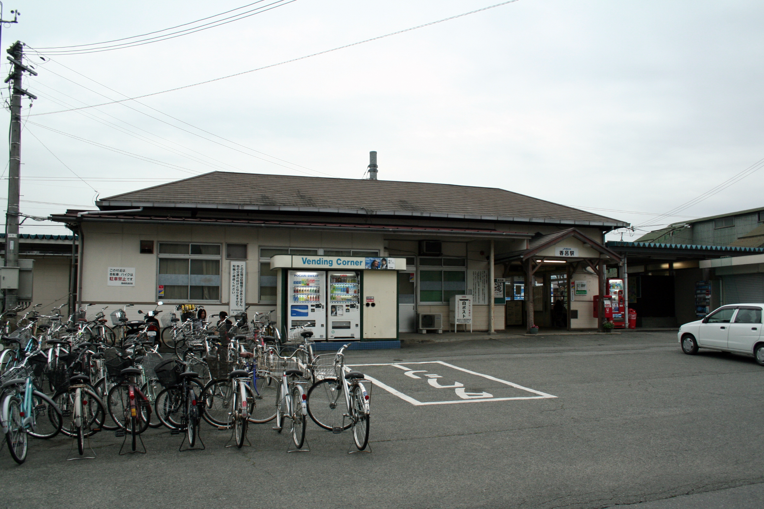 香呂駅。 東側にある駅舎。